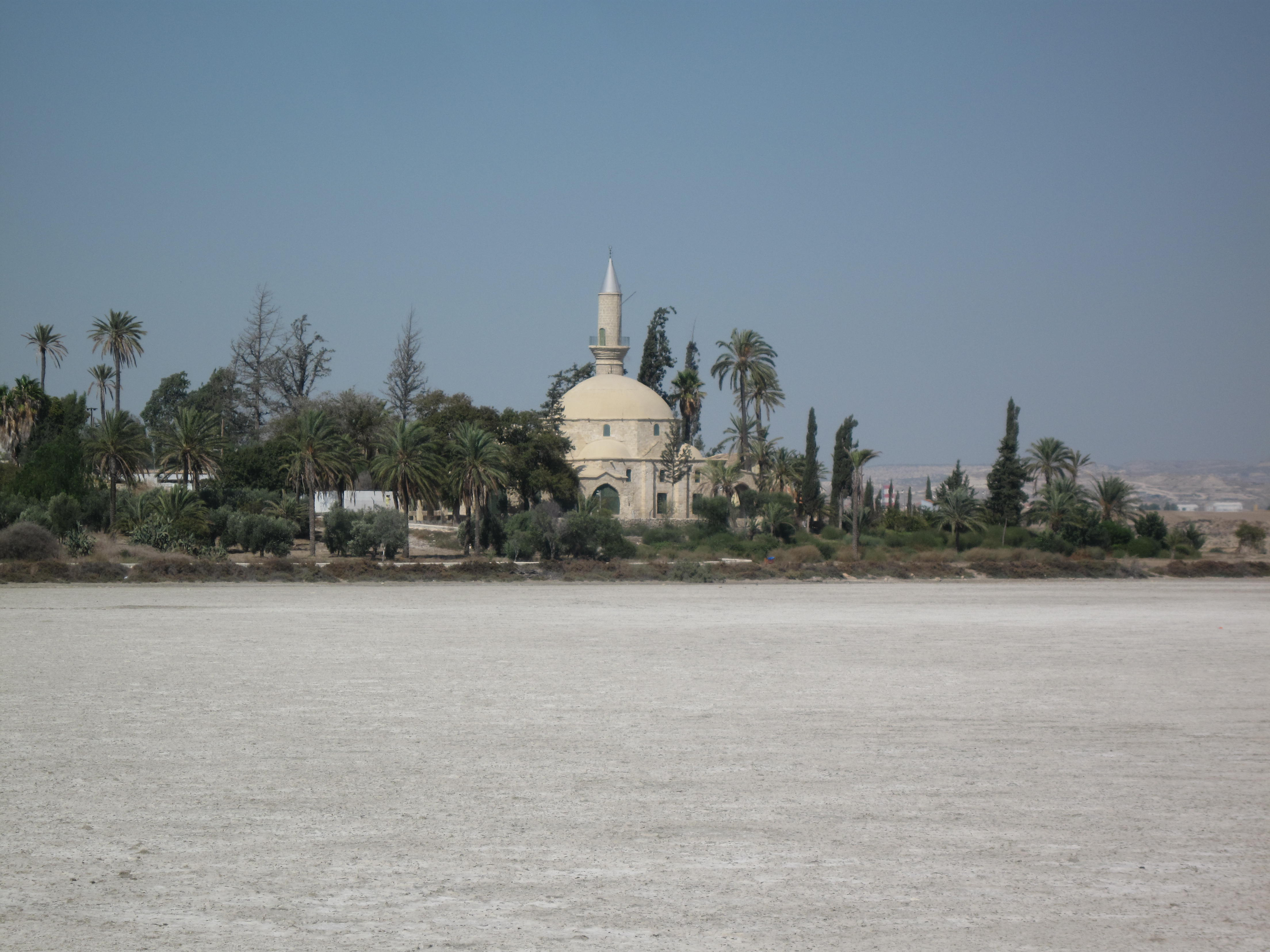 Cyprus - Larnaka Hala Sultan Tekke en zoutmeer